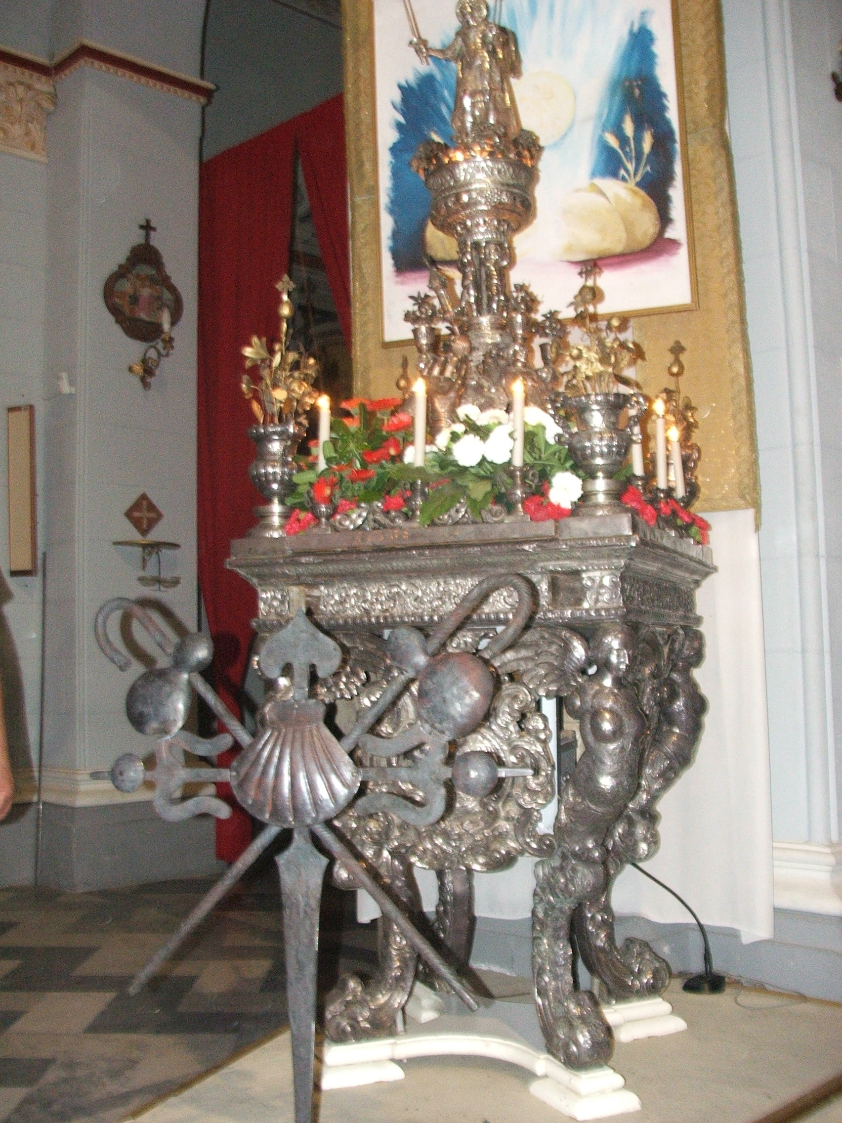 opera in argento del 1550 custodita a Camaro superiore simbolo dei Cavalieri di san Giacomo della spada.